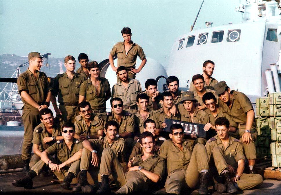 צוות אח"י געש בבסיס חיפה לפני היציאה לאילת